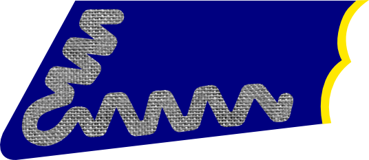 Łapka piechoty na kołnierz kurtki - II RP